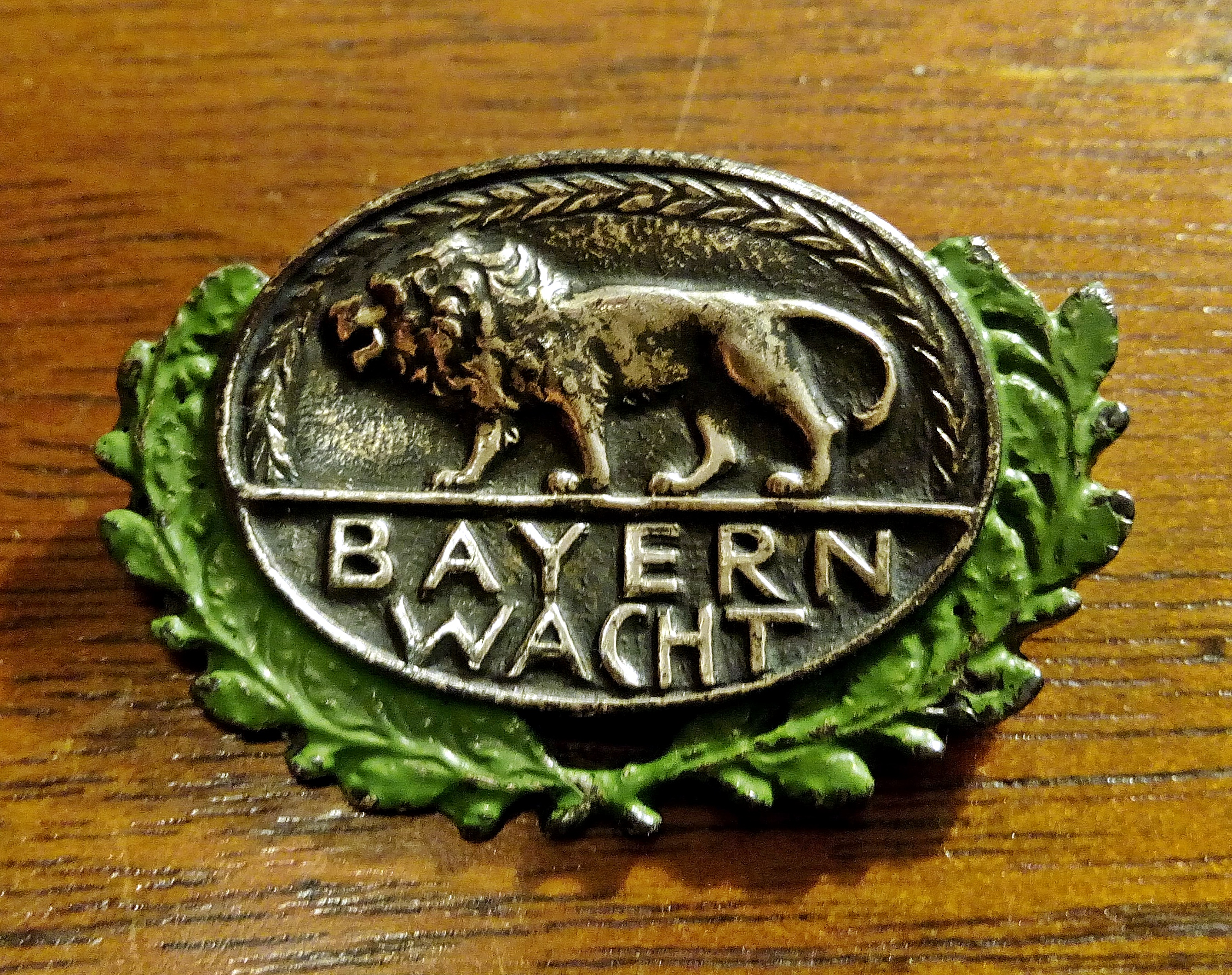 Abzeichen der Bayernwacht, um 1930. Eigenes Foto von eigenem altem Abzeichen.